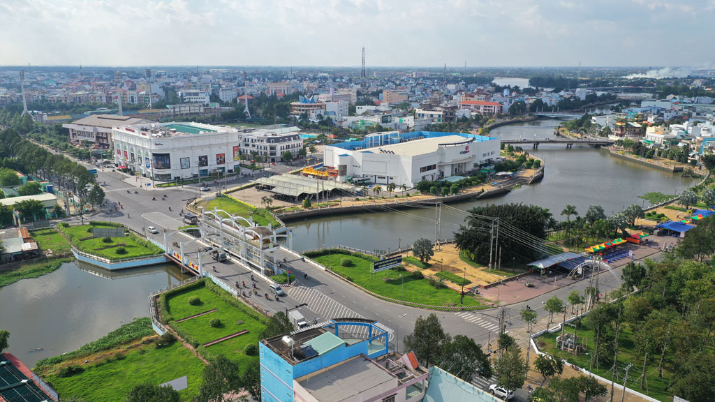 Một góc thành phố Tân An